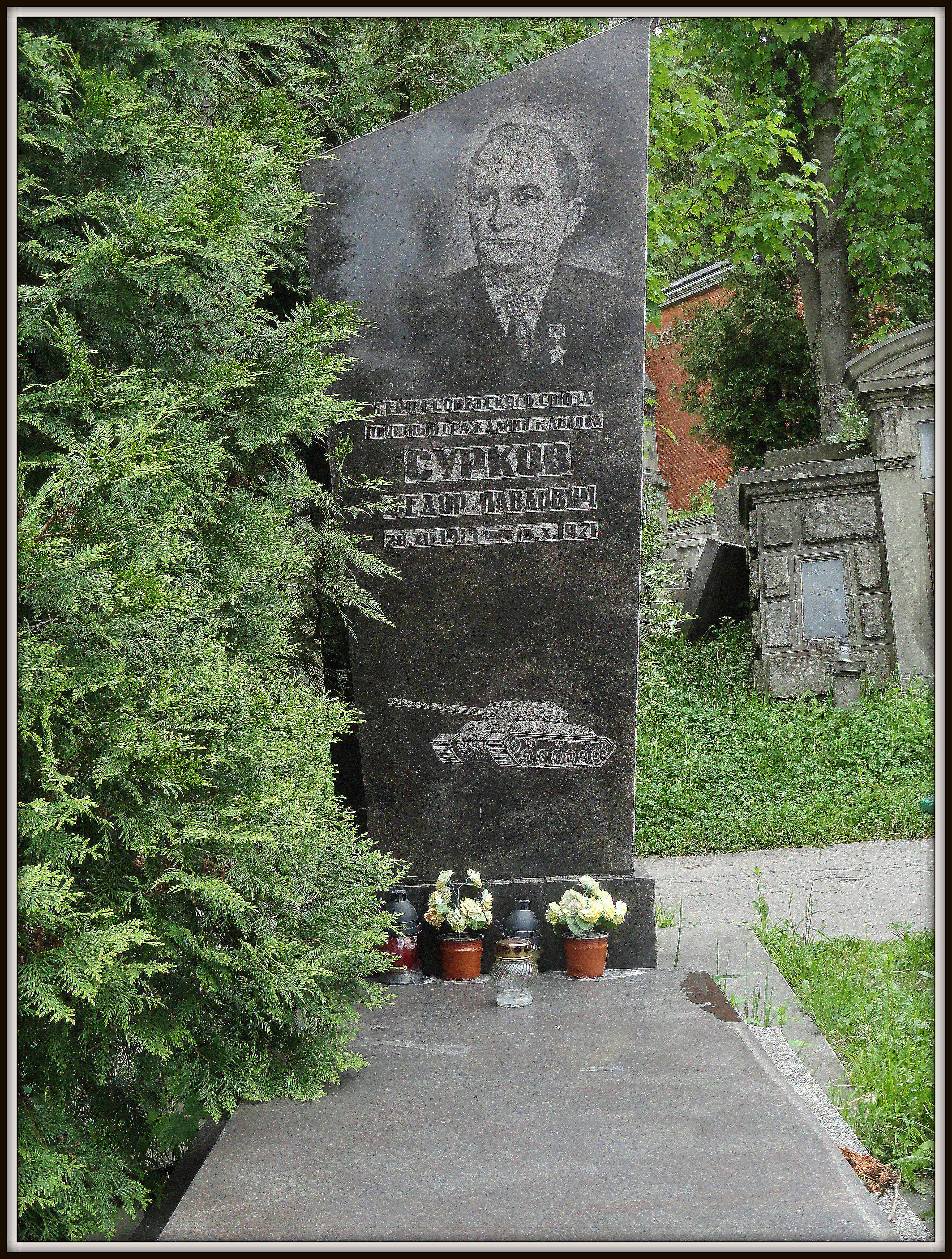 Памятник на могиле Героя Советского Союза, танкиста Фёдора Павловича Суркова на Лычаковском кладбище (Львов).